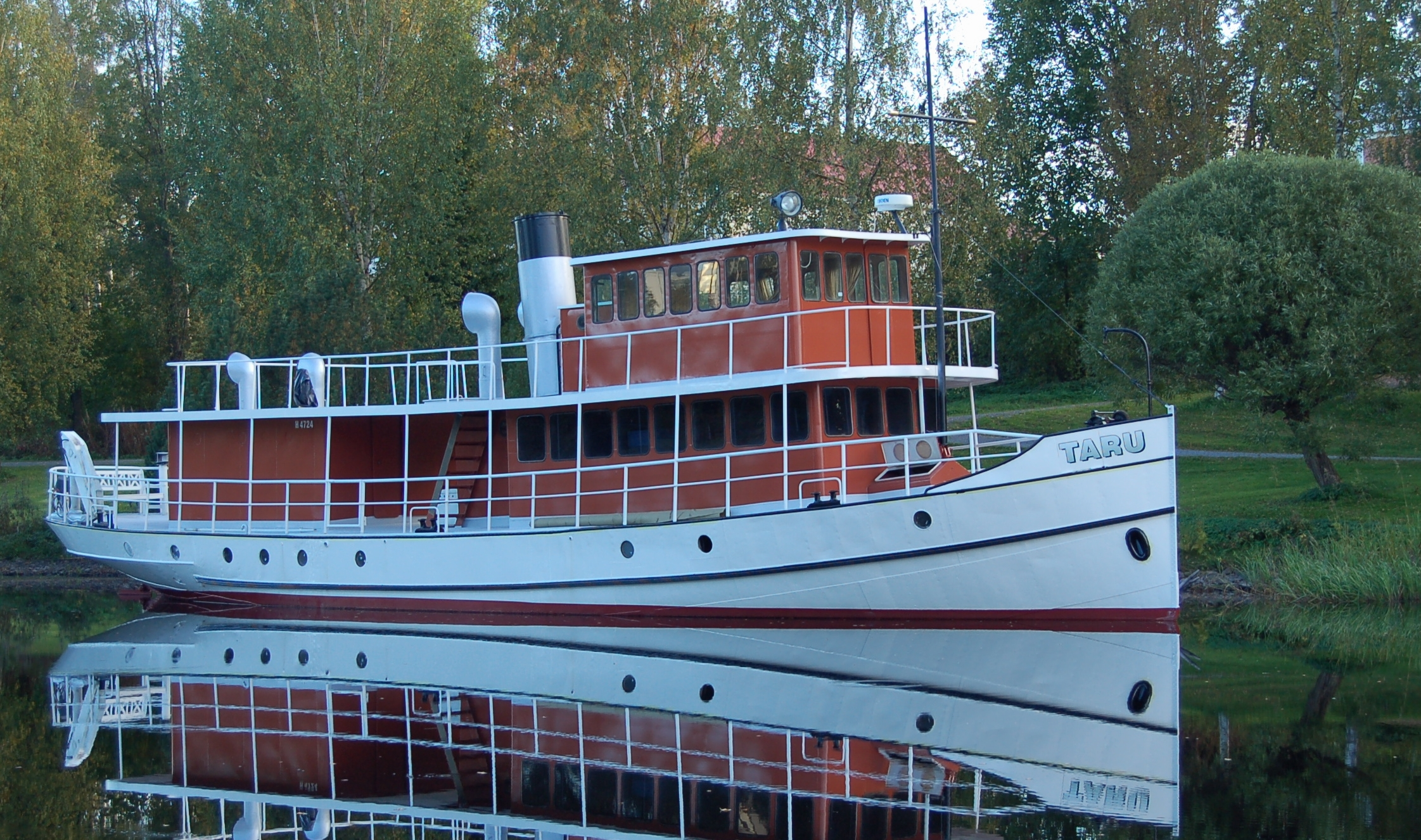 Taru Jämsänjoella syksyllä 2016